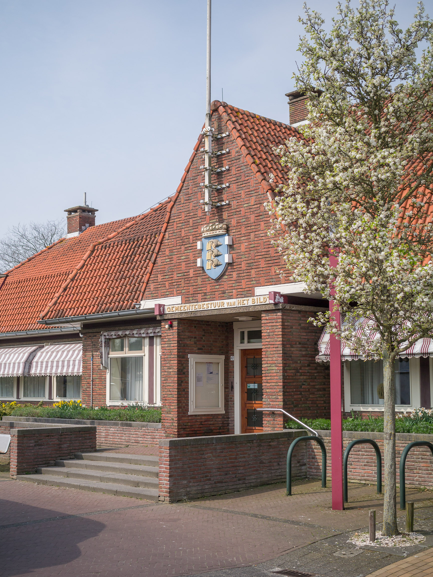 Gemeentehuis van het Bildt